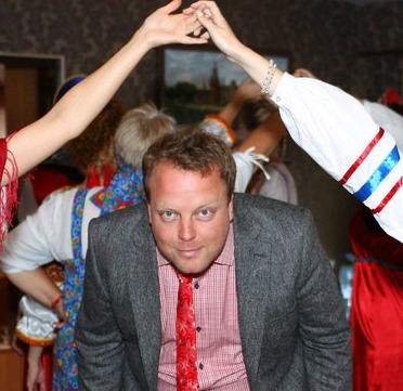 Kristoffer Lieng i Ryssland